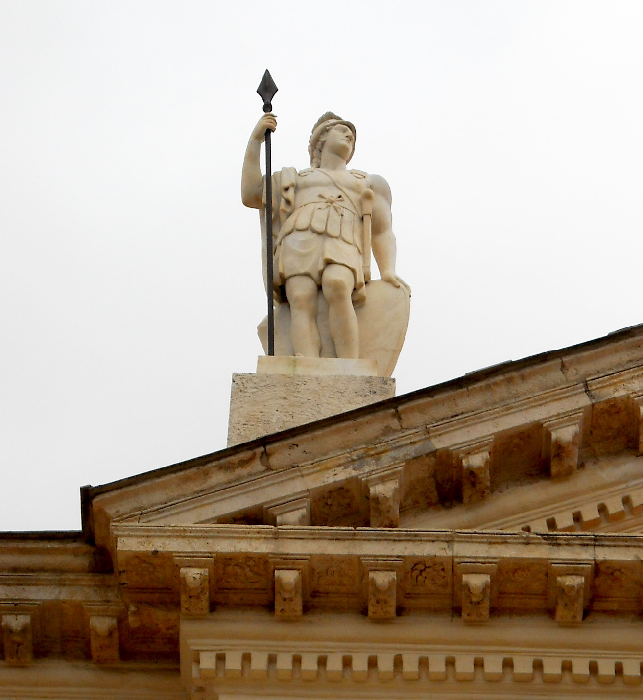 Scultura sopra l'entrata della Galleria comunale d'arte di Cagliari